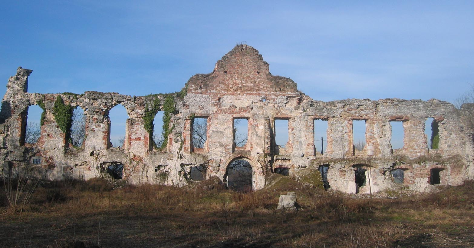 Boštanj (Weissenstein) castle, Slovenia photo:Ziga 11:18, 5 February 2007 (UTC)